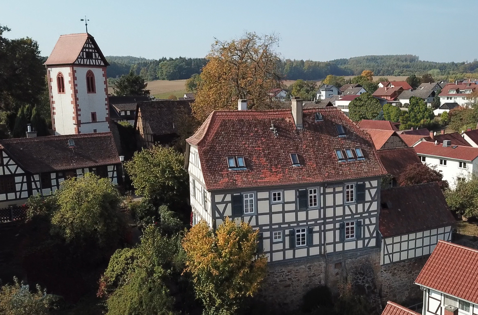 Das denkmalgeschützte alte Pfarrhaus. Erbaut 1730 - 33 vom Architekten J.K. Lichtenberg